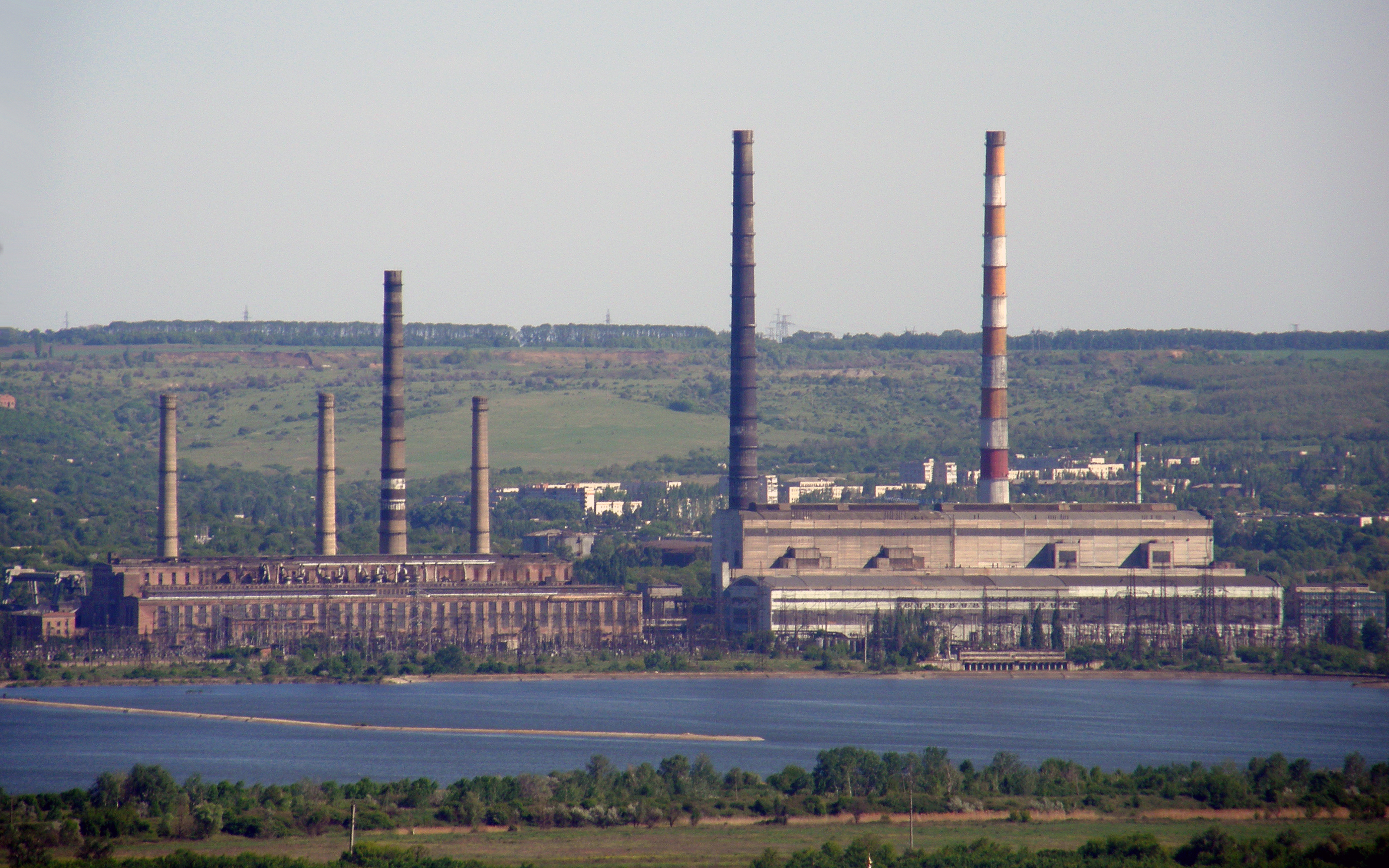 Славянская ТЭС